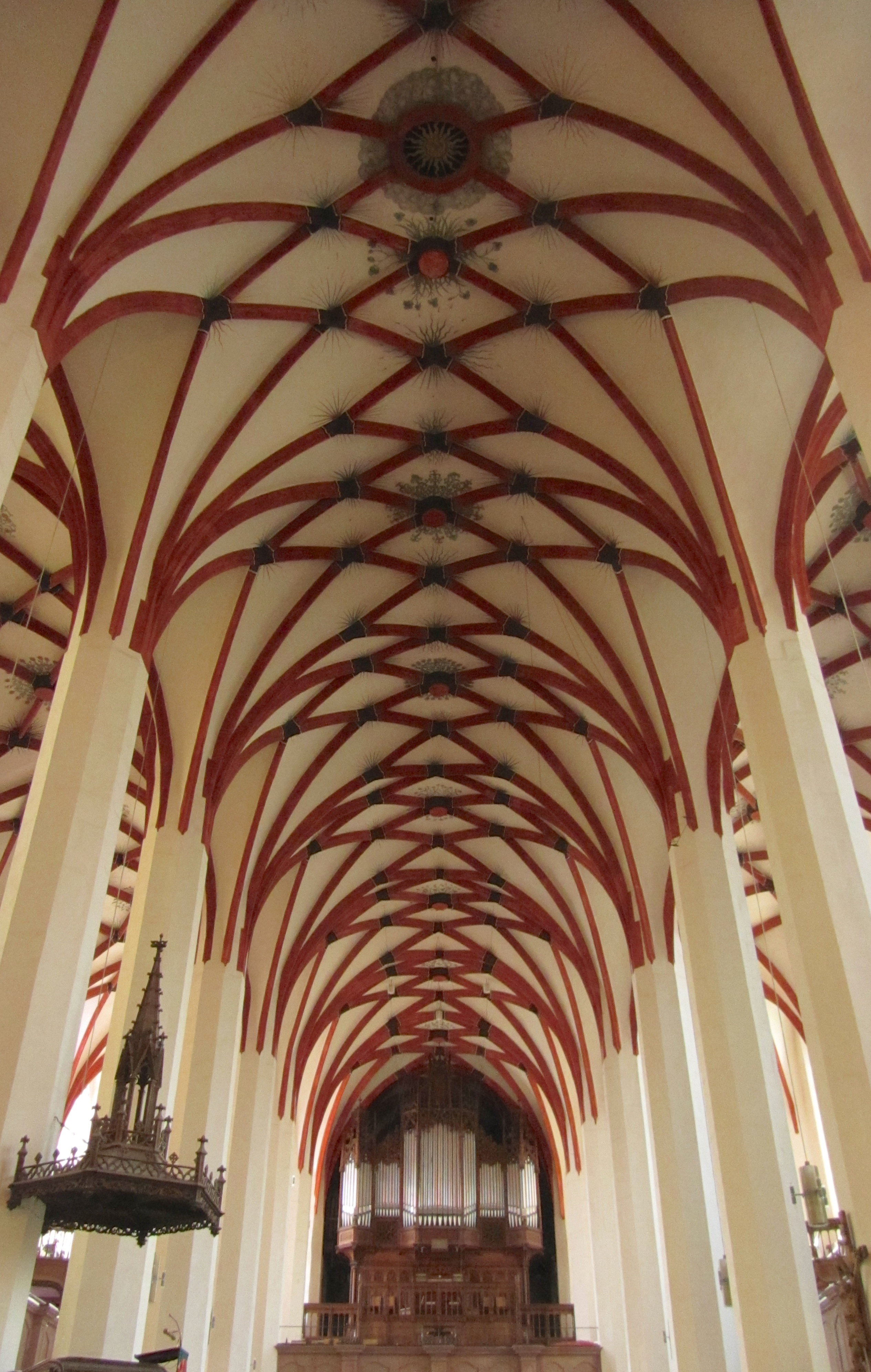 Decke der Thomaskirche Leipzig